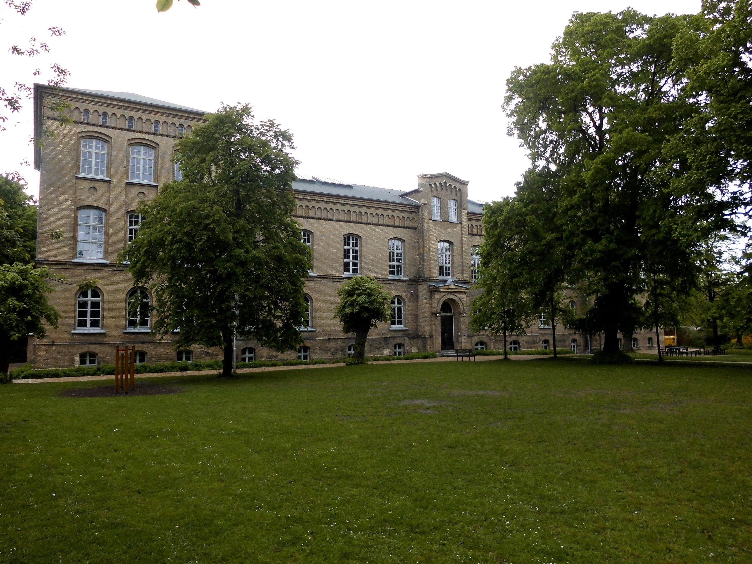 Lernwerft Skagerrakufer 5-6 im Kieler Stadtteil Friedrichsort.